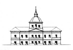 Беларуская (тарашкевіца): Чавусы (Čavusy). Ратуша, абмеры